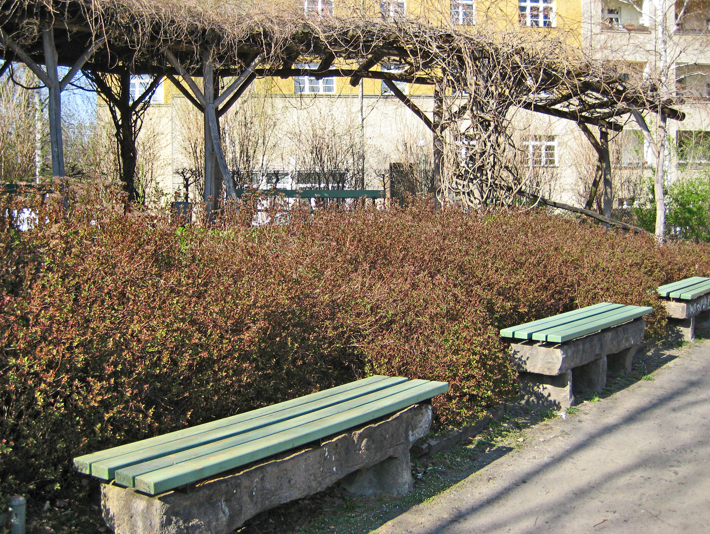 Brixplatz, Parkbänke